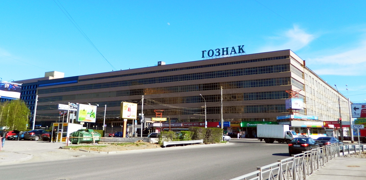 Гознак (Пермь)